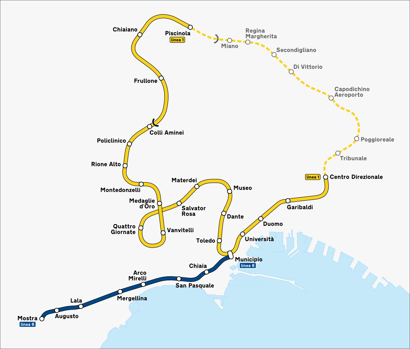 Mappa della metropolitana di Napoli.